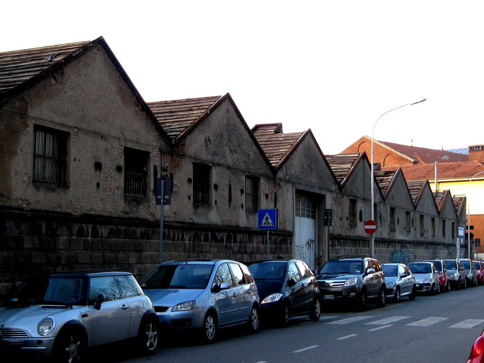 Monza il retro dei capannoni della ex fonderia Anzani in via Milazzo - sul fondo angolo con via Luciano Manara